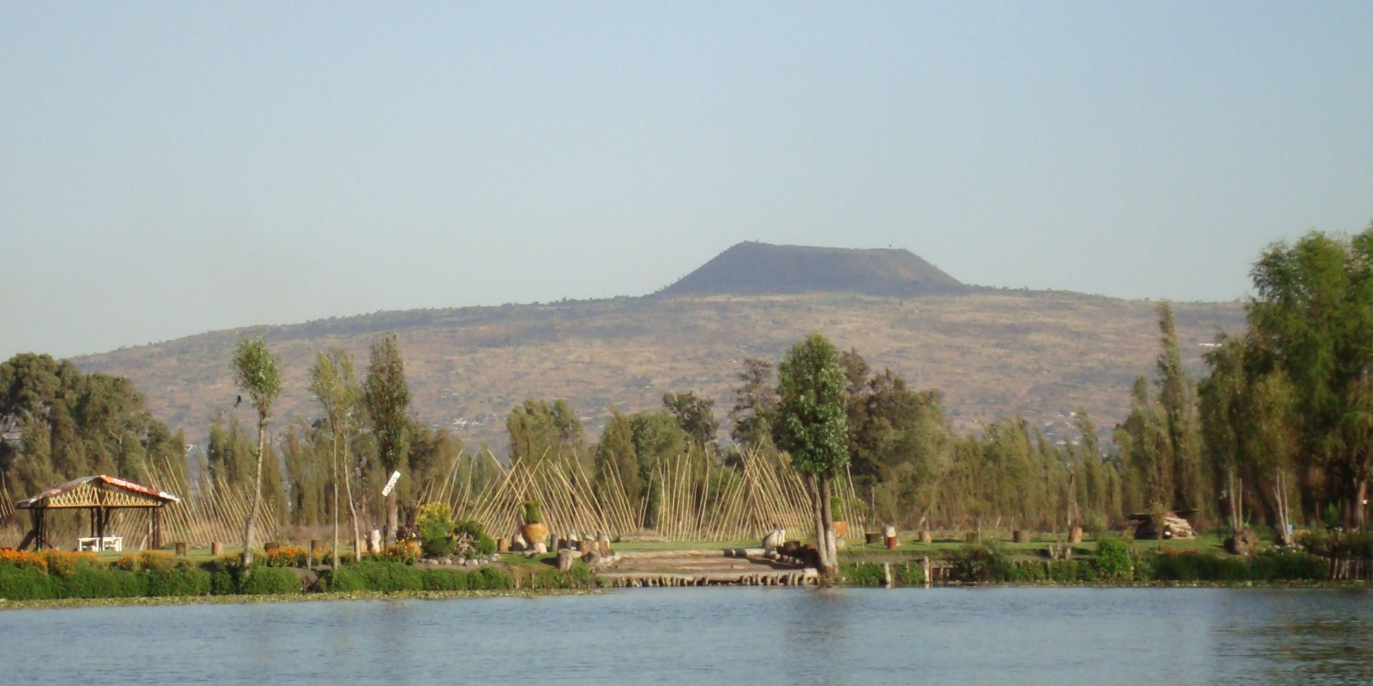 Vista del volcán Teuhtli desde el lago Huetzallin, en Xochimilco (México).